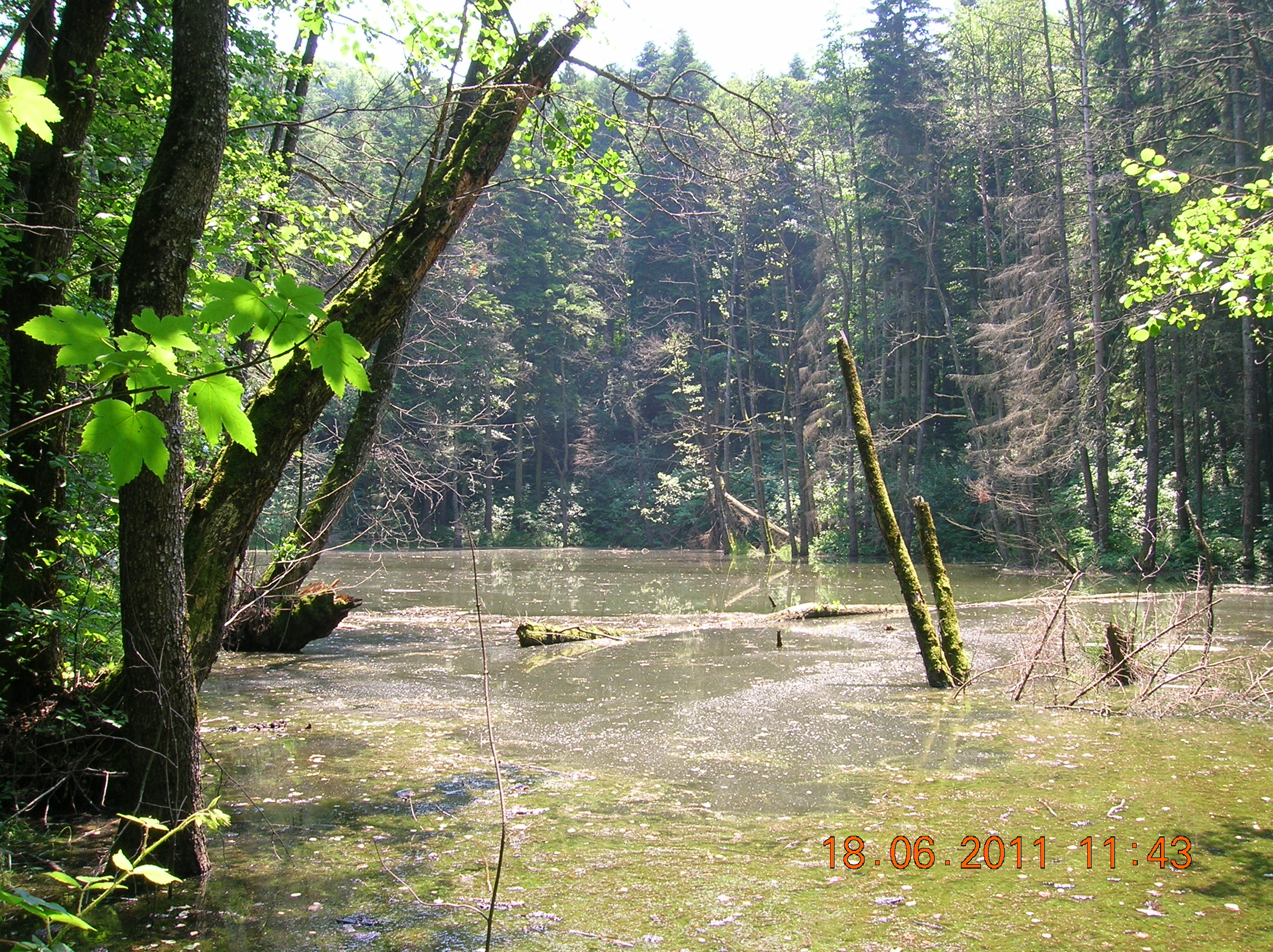 Munţii Tarcăului (Carpaţii Orientali, România)-Lacul Veselaru (Sat Neguleşti, Comuna Piatra Şoimului)